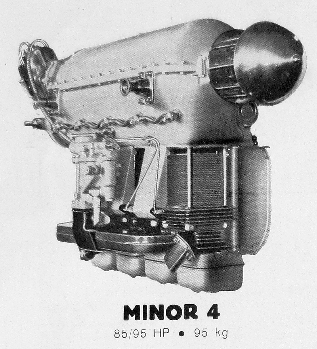 letecký motor Walter Minor 4 (1936)